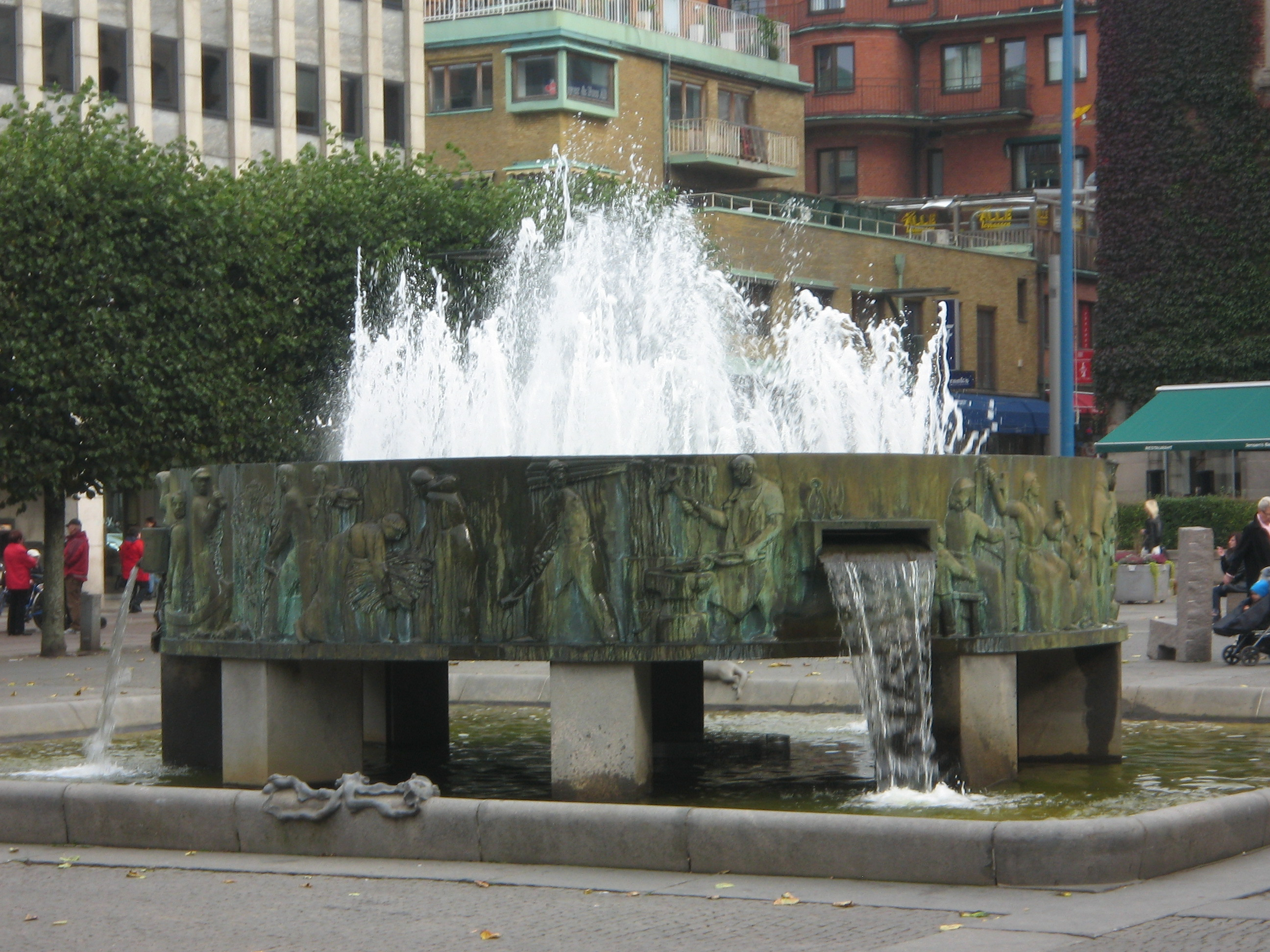 Nils Sjögrens Sjuhäradsbrunnen på Stora torget i Borås, invigd juni 1941.